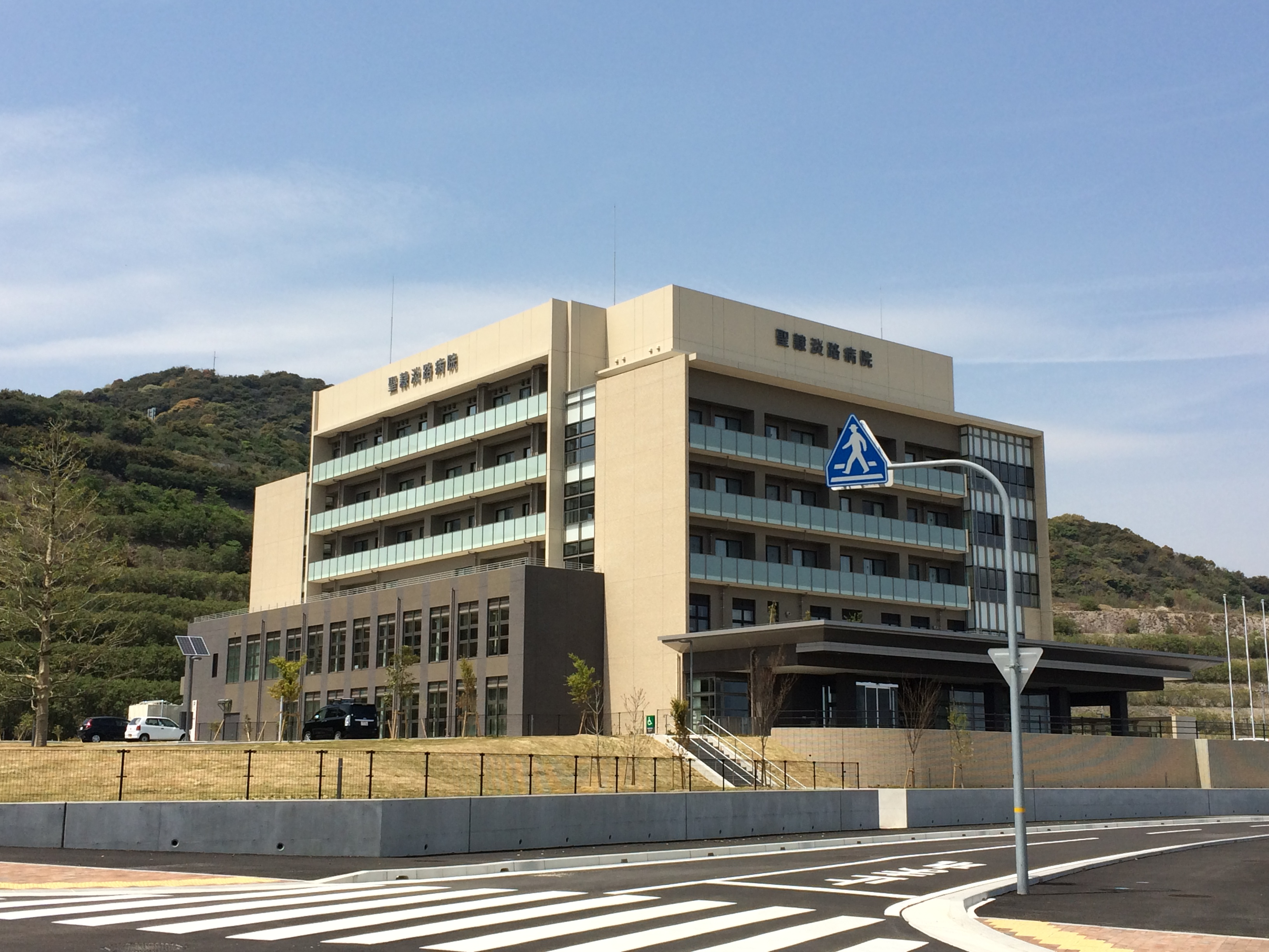 聖隷淡路病院外観